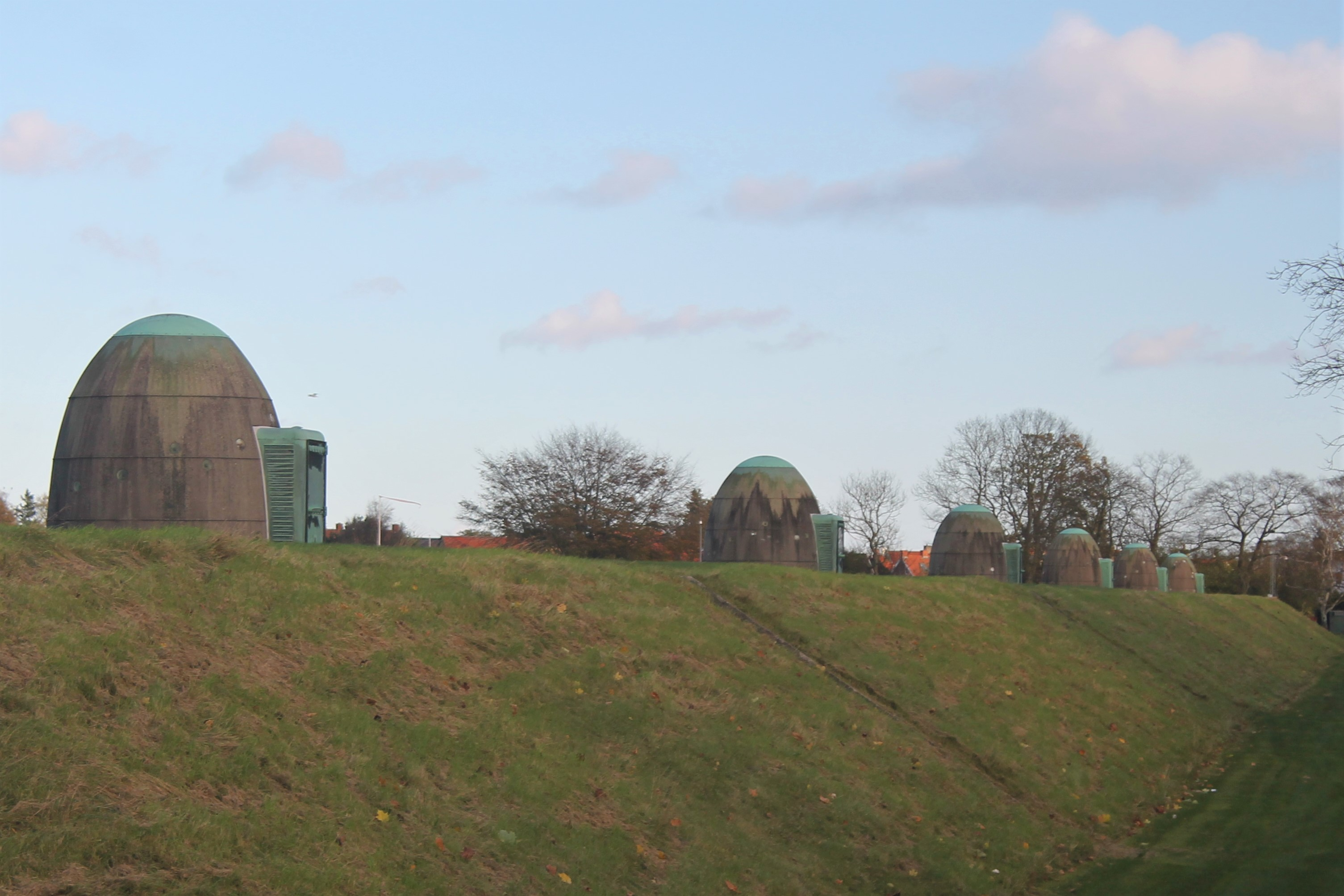 Tinghøj Vandreservoir